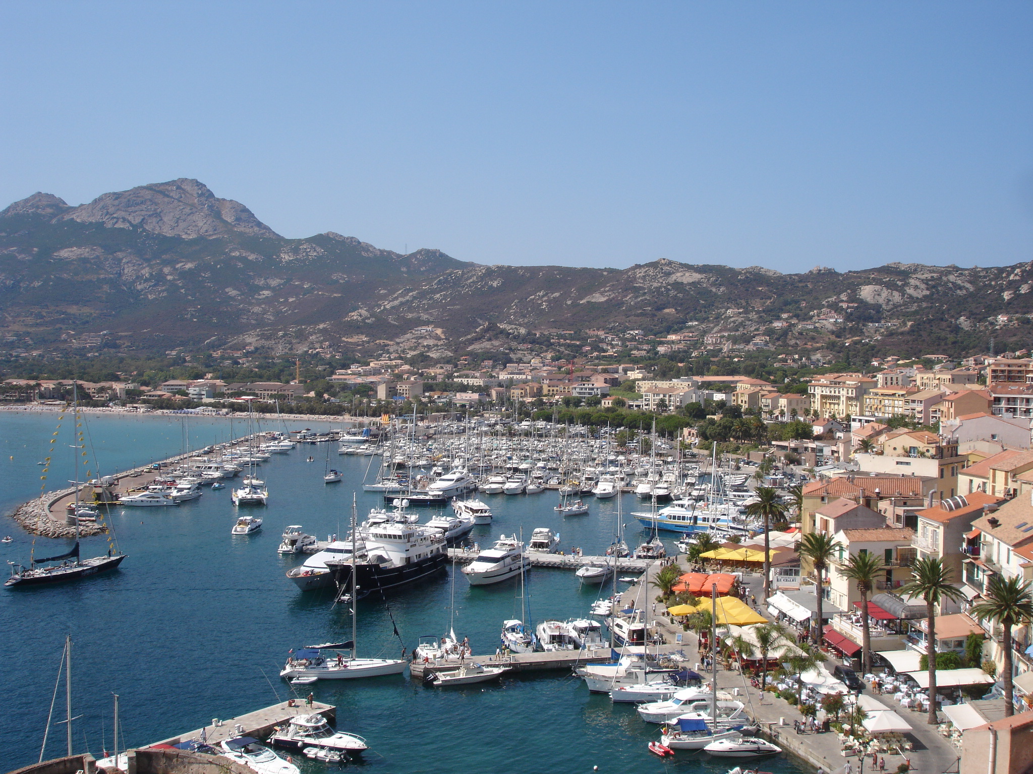 France, Haute-Corse (2B), Calvi